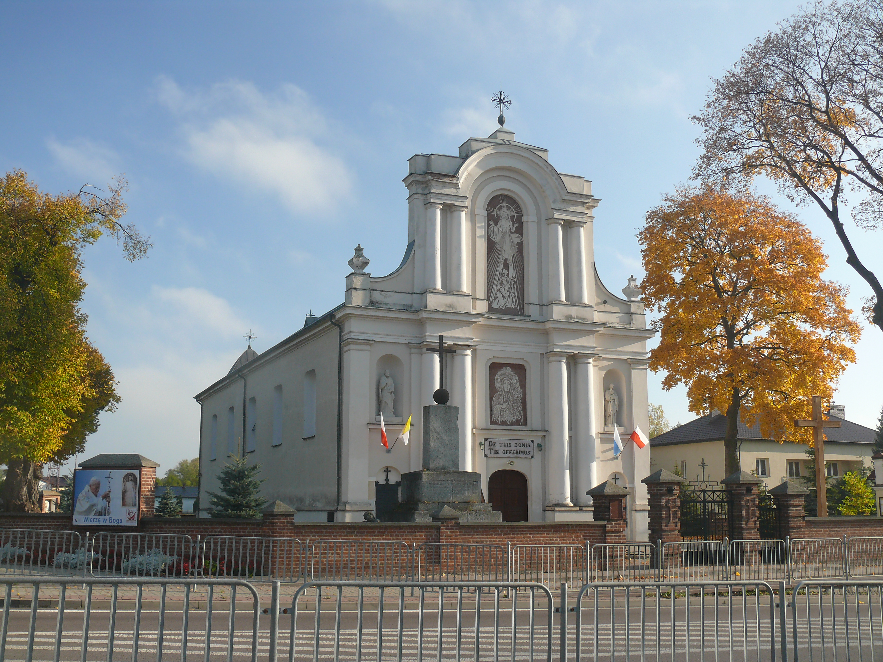 kościół parafialny p.w. św. Jana Nepomucena w Fajsławicach, woj. lubelskie